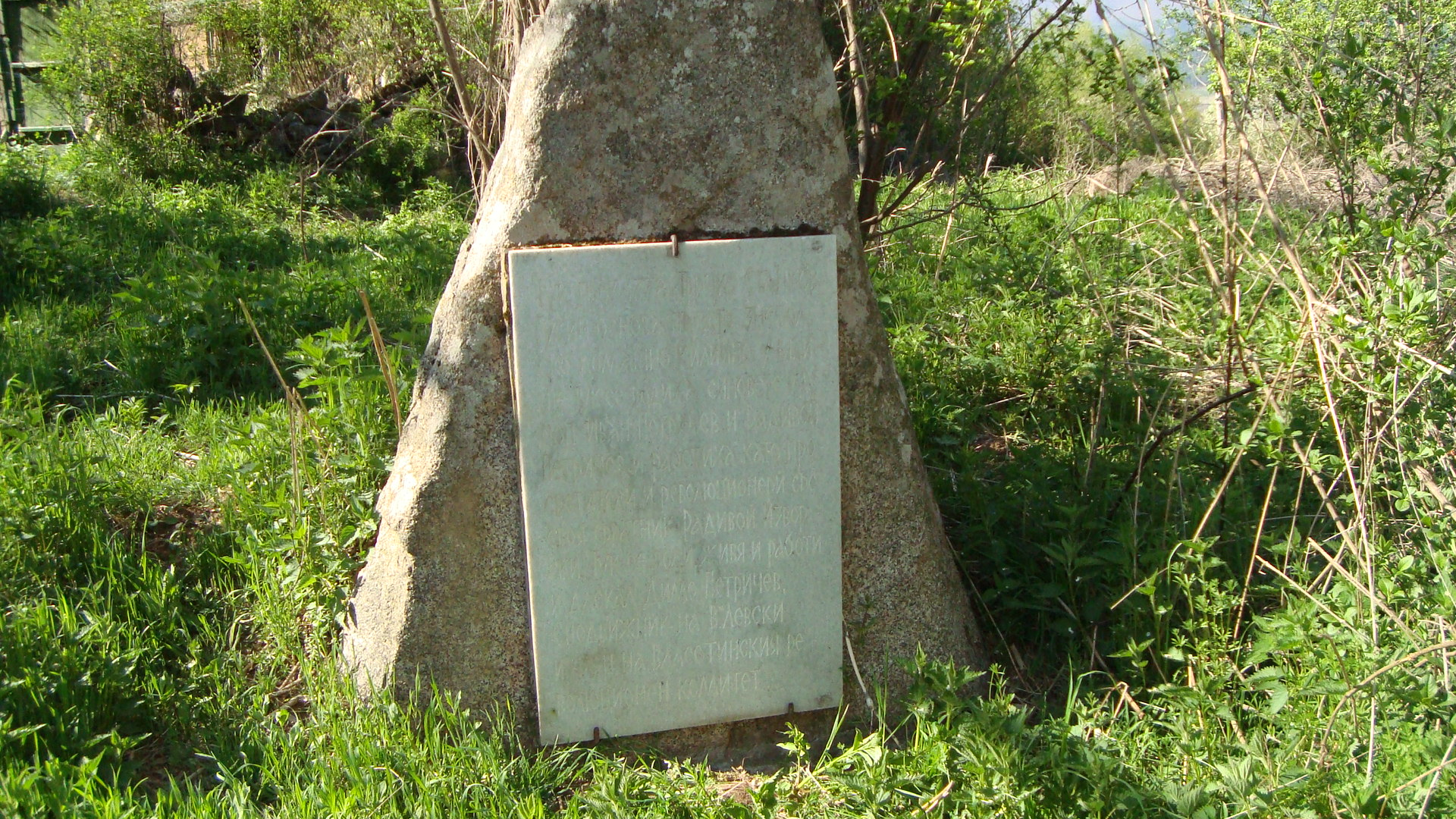 Плочата се намира близо до самата сграда и пътя.